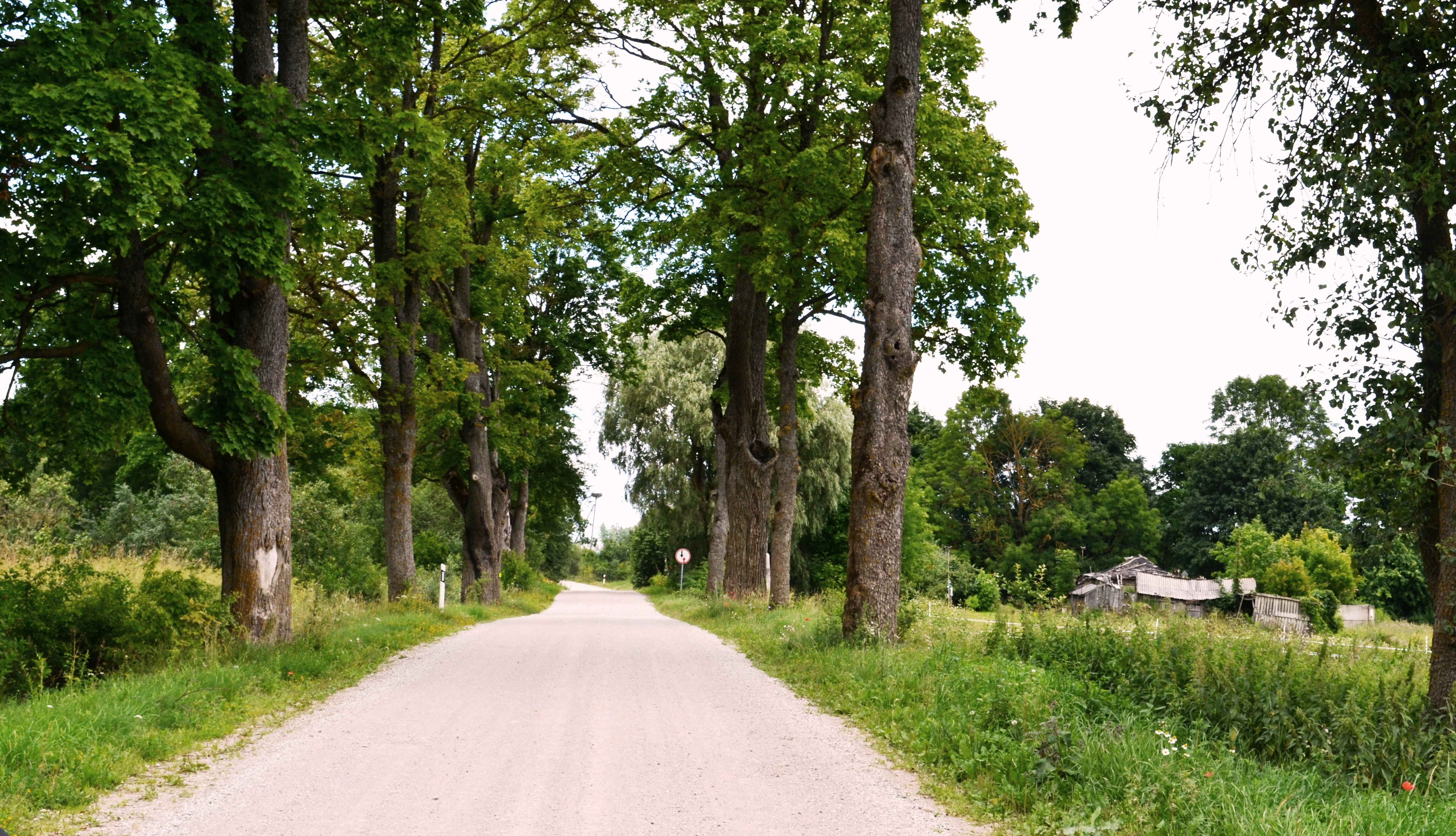 Vadaktai, Panevėžio raj.